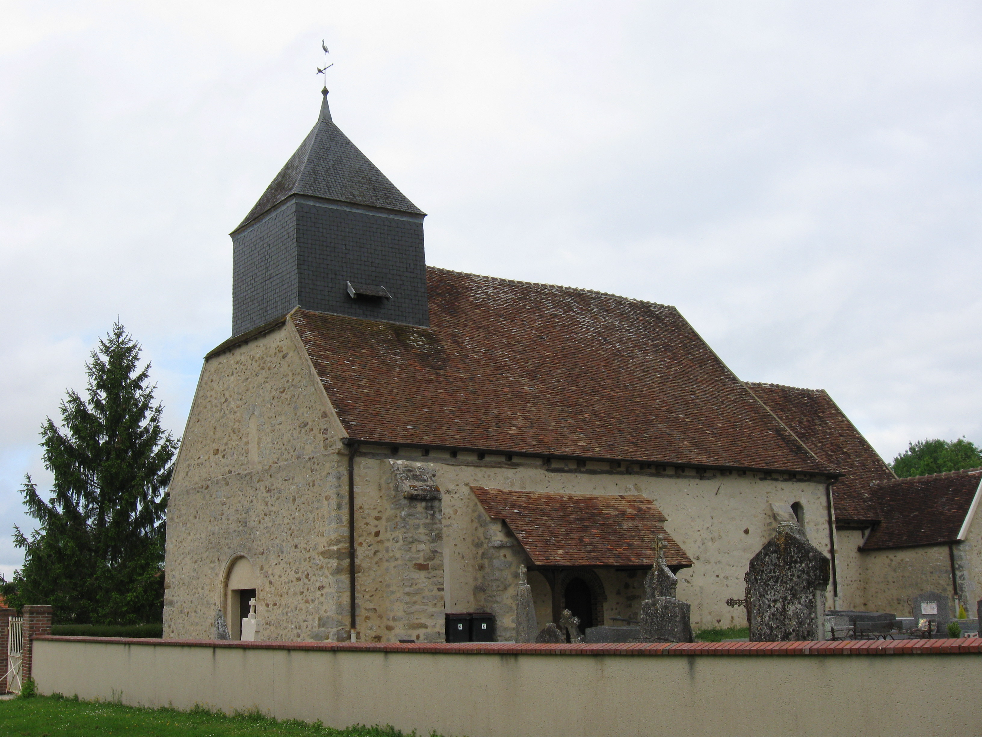 Église Saint-Quentin de Passy-sur-Seine. (Seine-et-Marne, région Île-de-France).